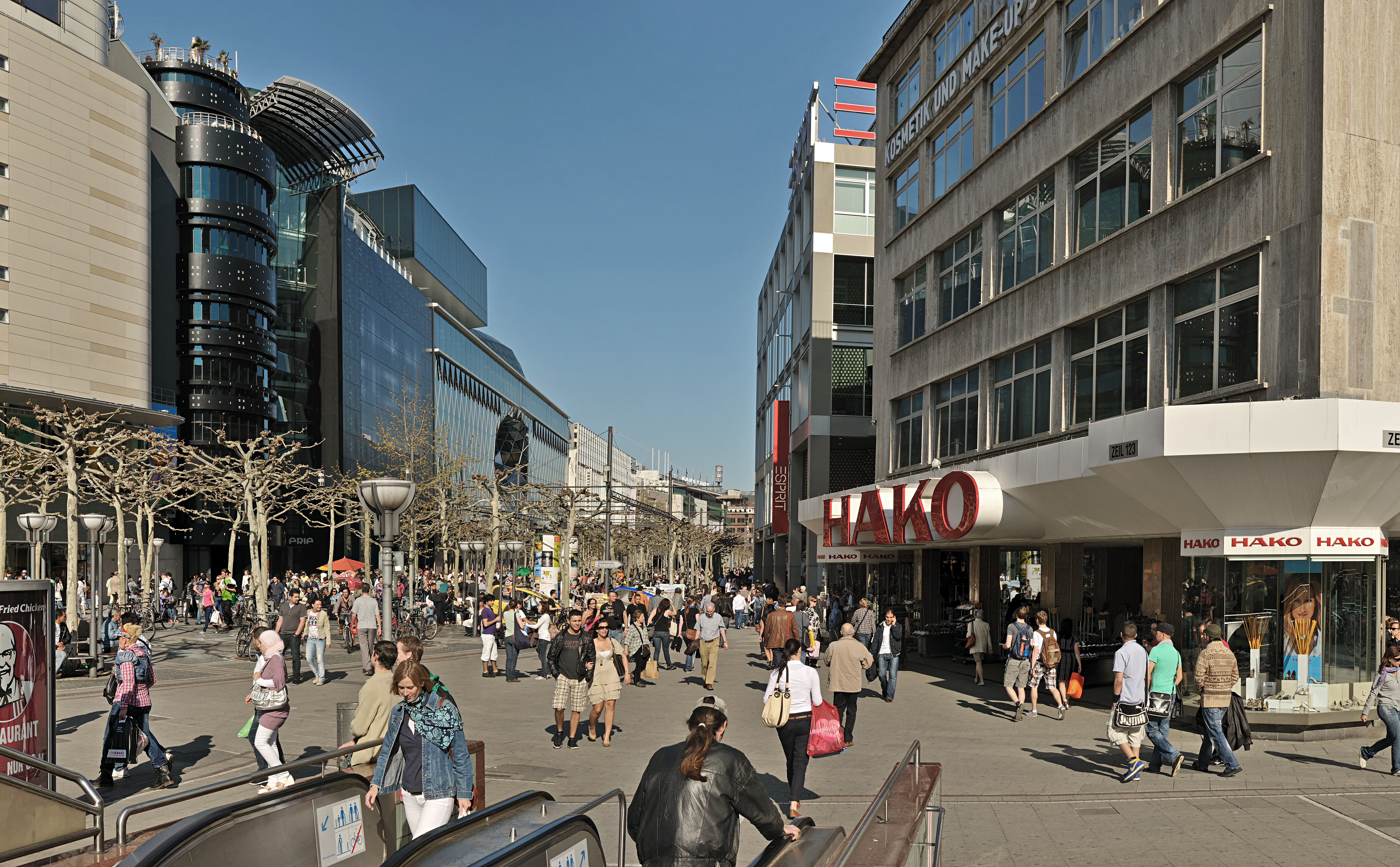 Die Zeil in Frankfurt am Main im April 2011 Blick von der Plattform an der Verkehrsinsel